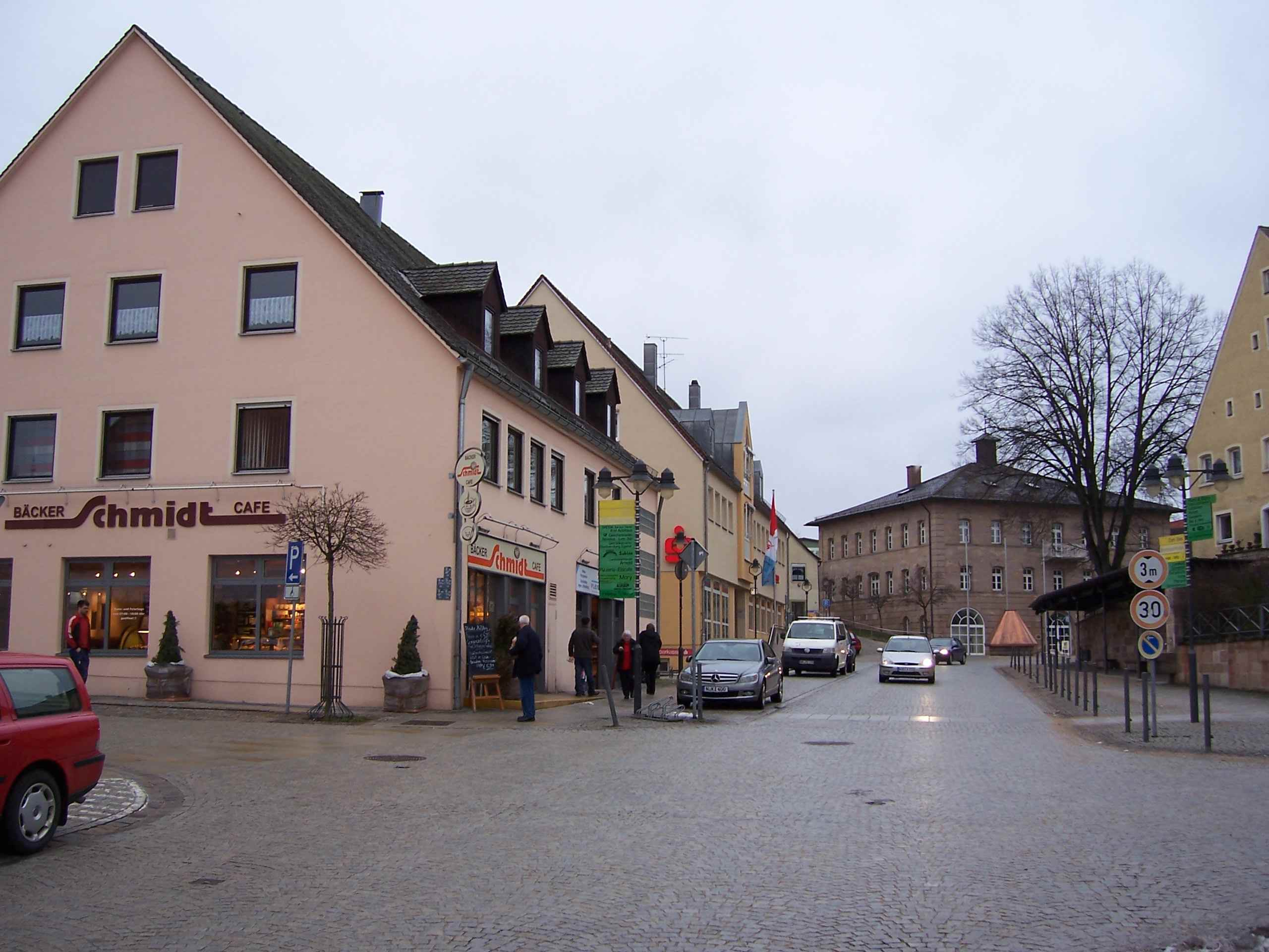 Marktplatz Pleinfeld links